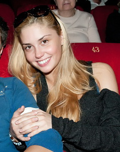 Актриса Агата Муцениеце. 2011 год